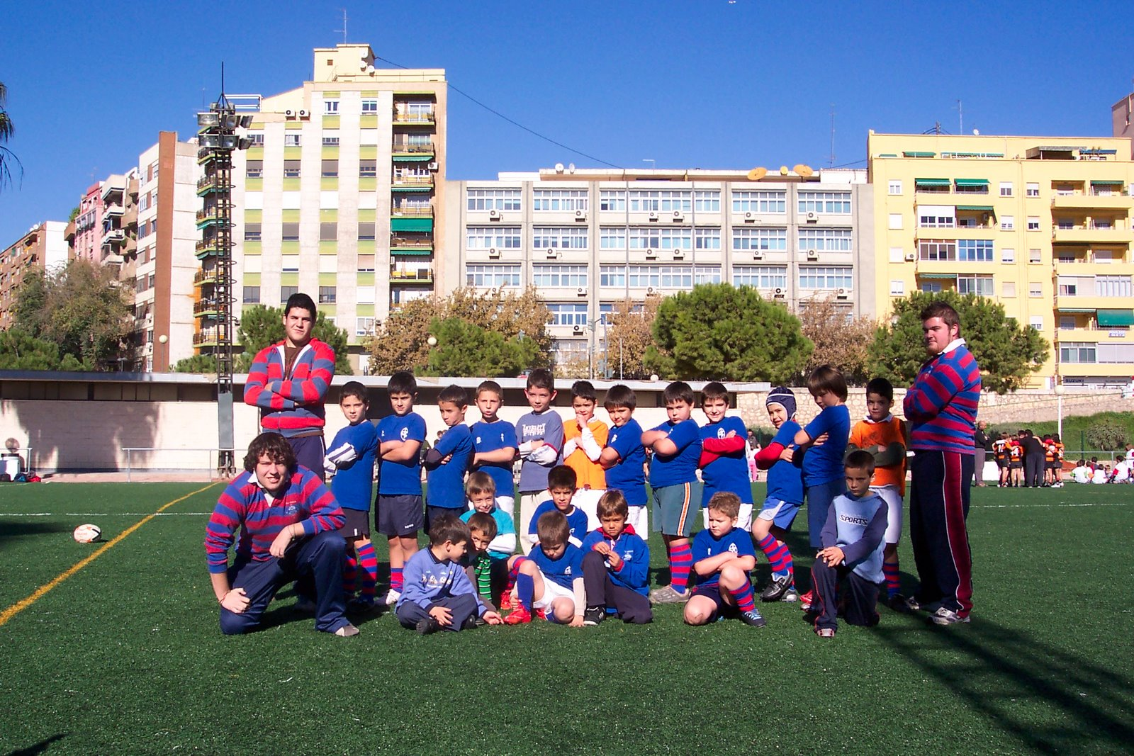 Equipo de Prebenjamines del San Roque